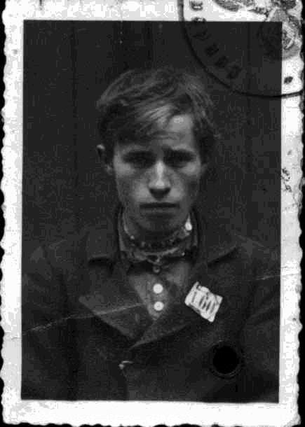 Остарбайтер Левковский Николай, №160, Люнебург, 1942 г.